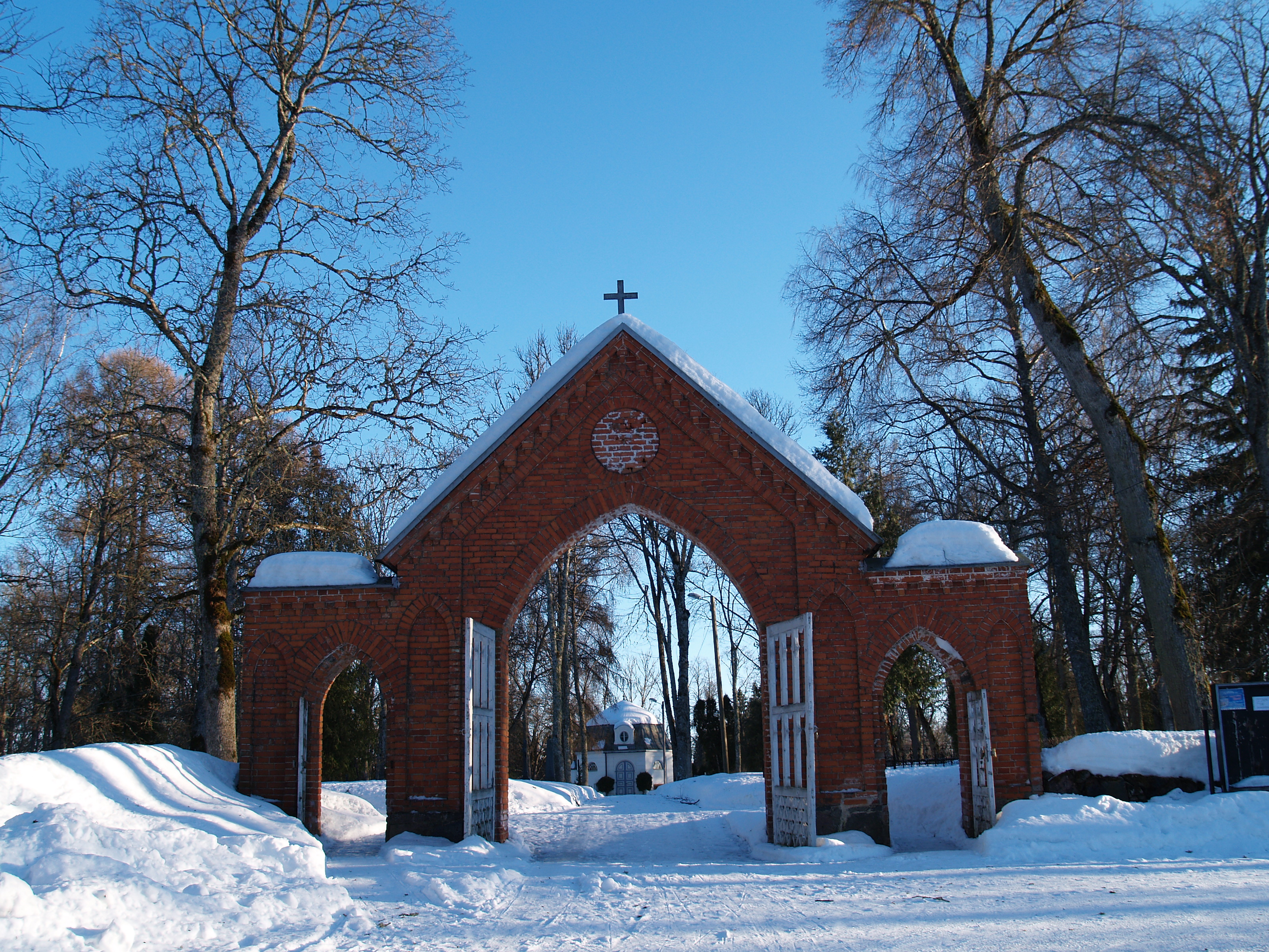 Suure-Jaani kalmistu värav. Taustal on kalmistu.